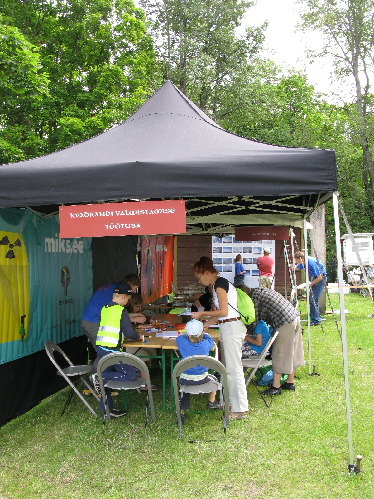 Kvadrandi valmistamise töötuba Tartu tähetorni juures Tartu hansapäevadel, 20. juulil 2012. Foto: Oop.